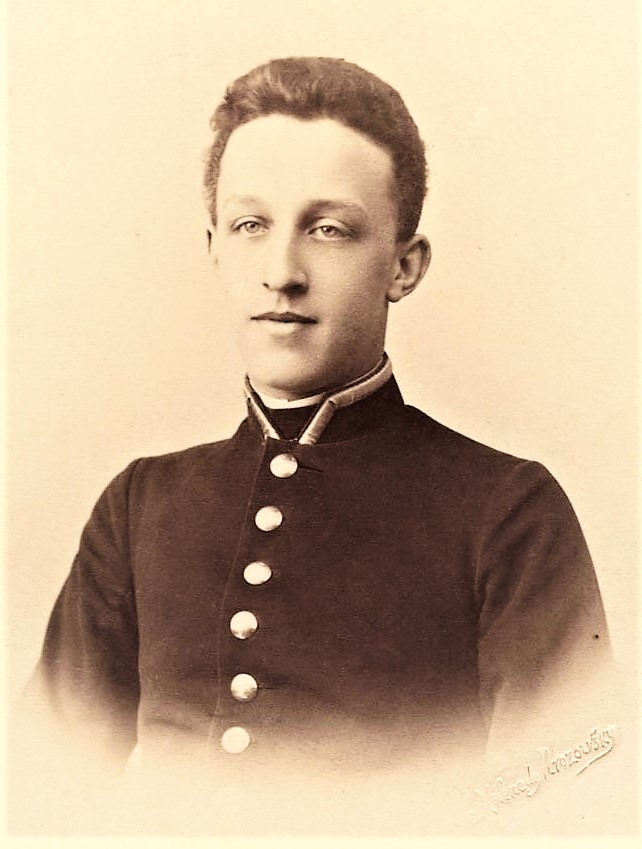 Выпускник гимназии Александр Блок перед поступлением в Петербургский университет